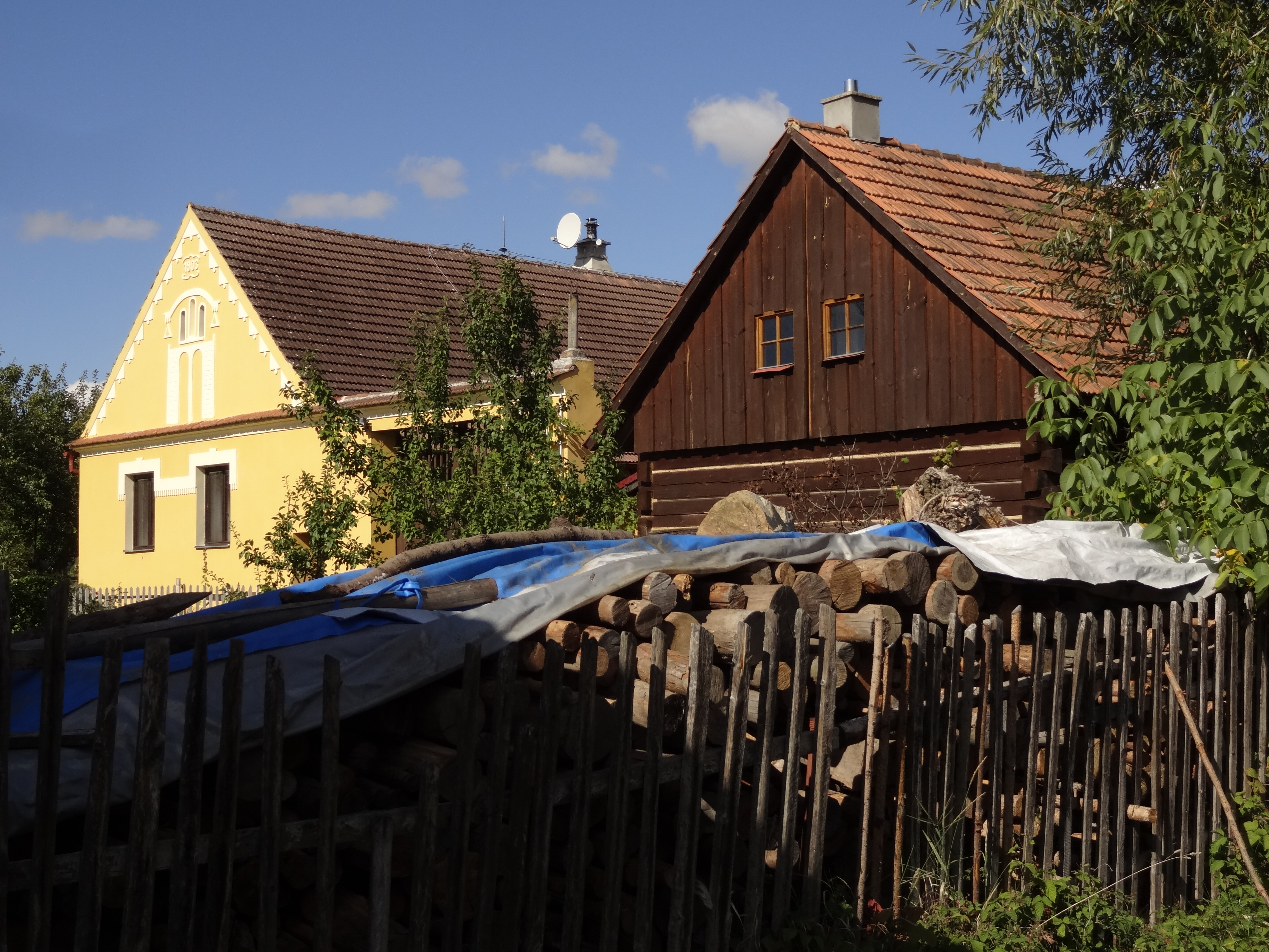 Sýpka u čp. 10, Drahotěšice 10, Drahotěšice.